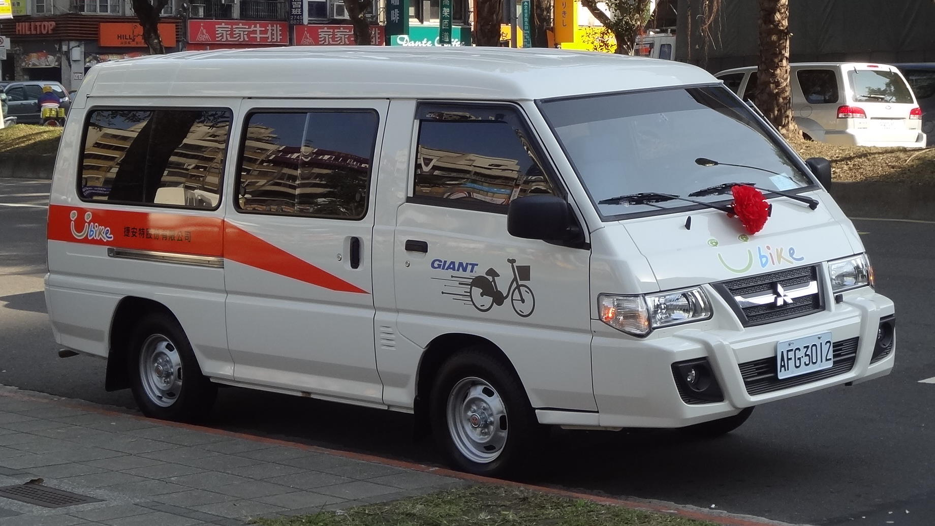 捷安特的臺北市公共自行車租賃系統服務車AFG-3012，使用三菱得利卡廂型車。